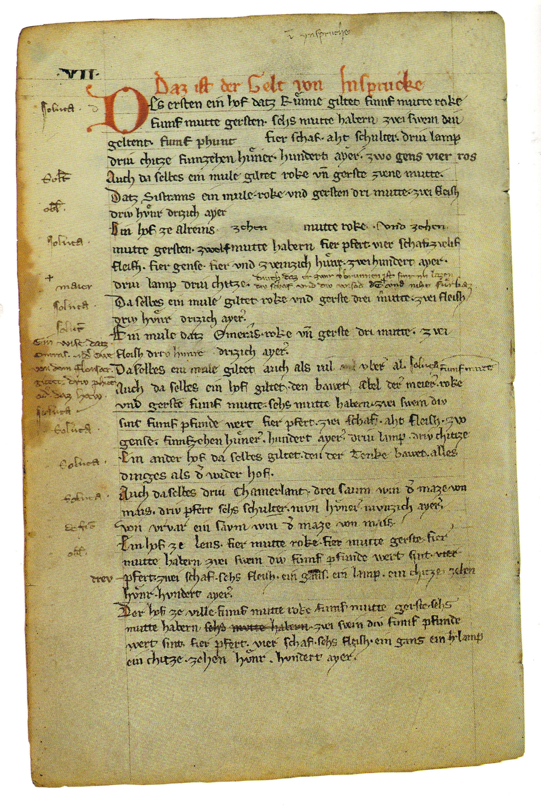 Urbar Meinhards II. von Tirol, 1288; Wien, ÖNB, Cod. 2699*